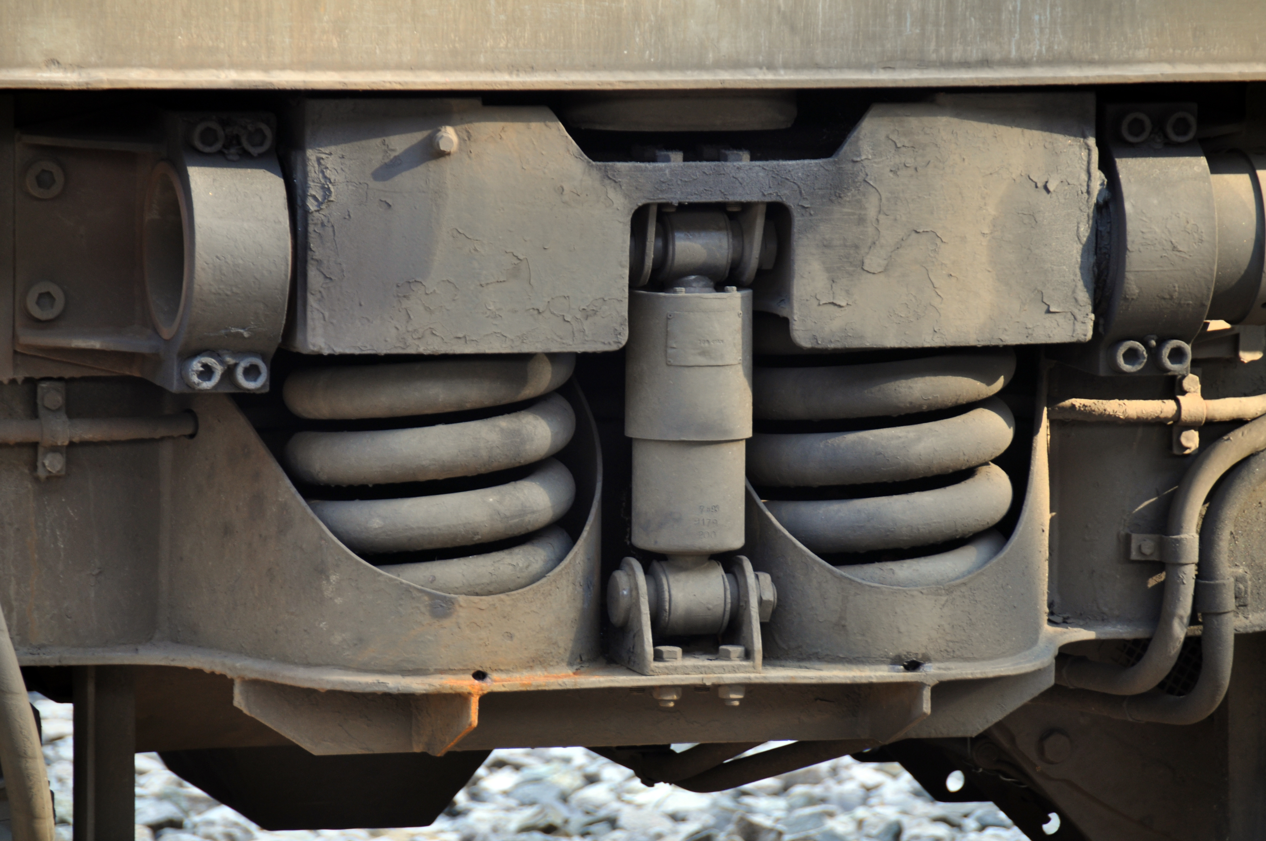 Erfurt Hauptbahnhof